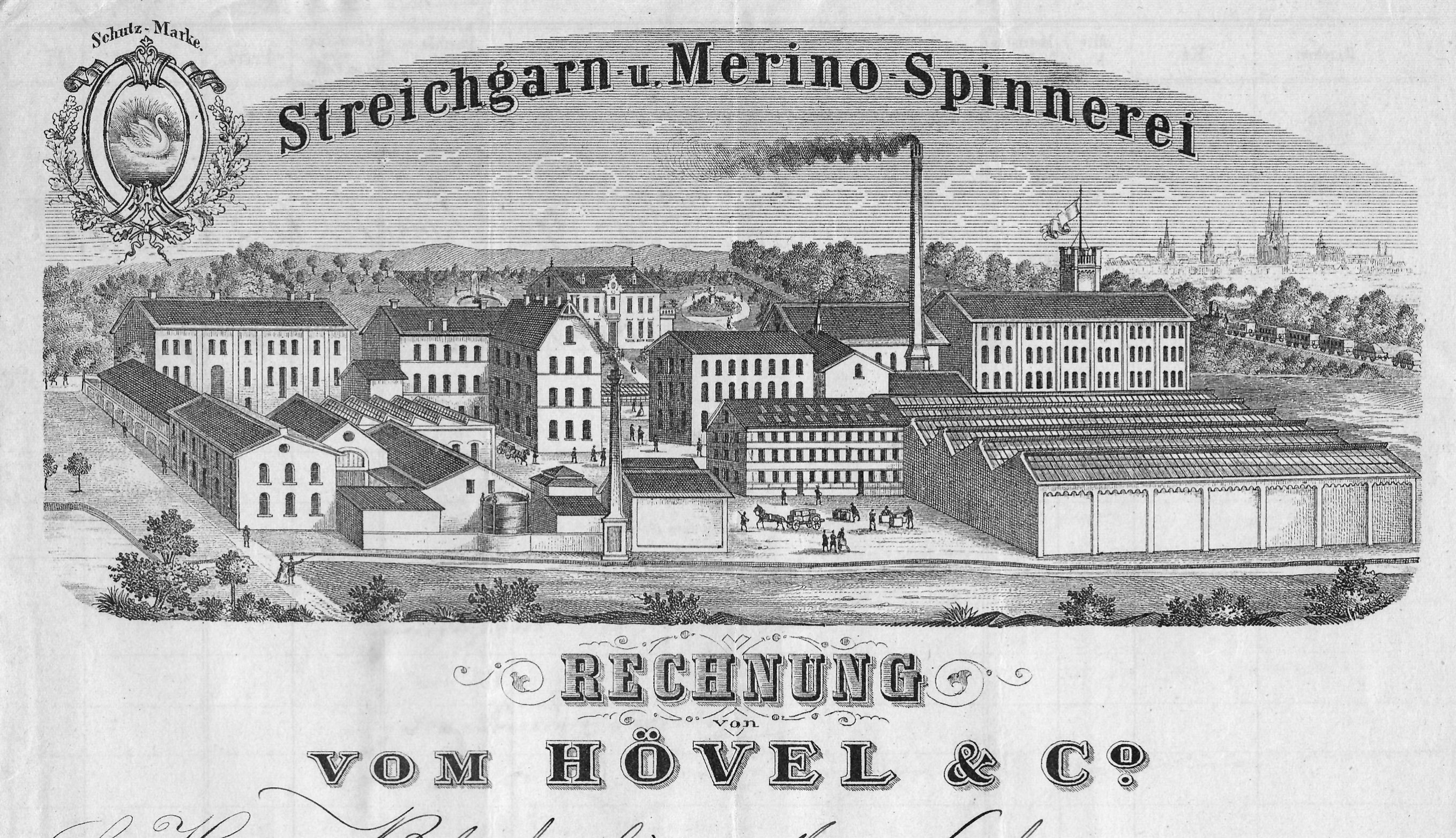 Briefkpf Fa. vom Hövel & Co. 1885